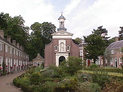 Het Bredase Begijnhof is een door muren omringd complex bestaande uit huisjes en een kleine kerk in het centrum van Breda. Zelf gemaakt, GFDL categorie:afbeelding Breda